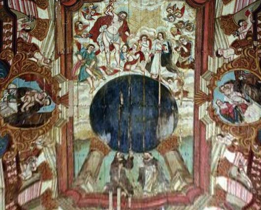 Detalhe de pintura no Convento de Santo Antônio de Cairu